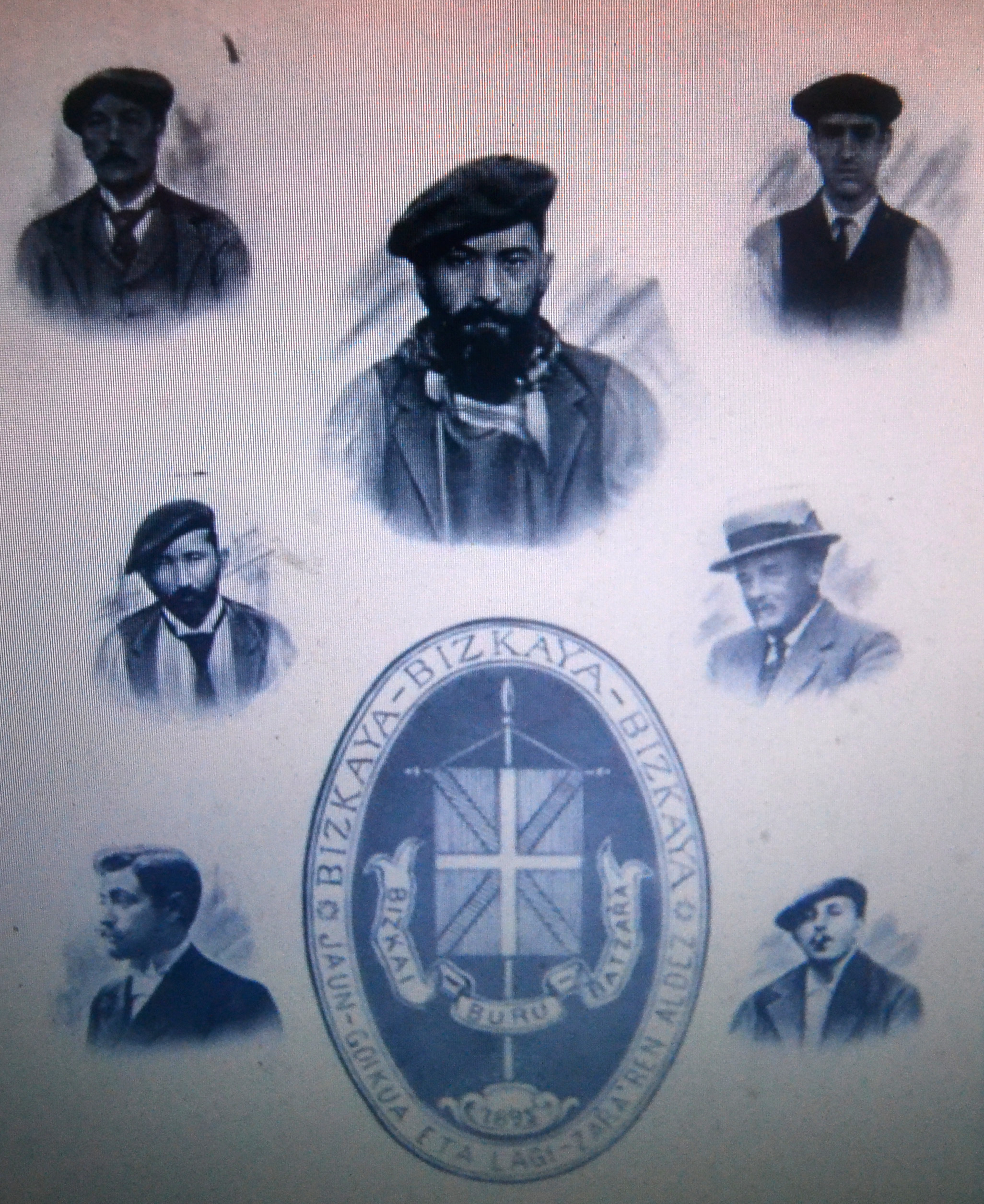 Bizkai Buru Batzar, 1895. Ezkerretik eskuinera eta goitik behera: Juan Aranburuzabala, Elias Lekue, Sabin Arana Goiri, Luis Arana Goiri, Ziriako Llodio, Salbador Etxeita eta Fabian Izpitzua.